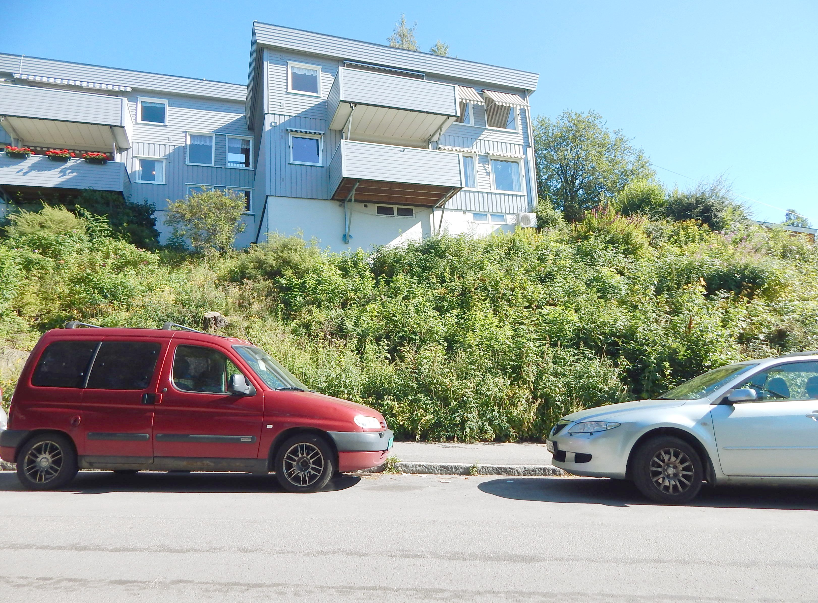 Haugerudhagan nær nordøstenden